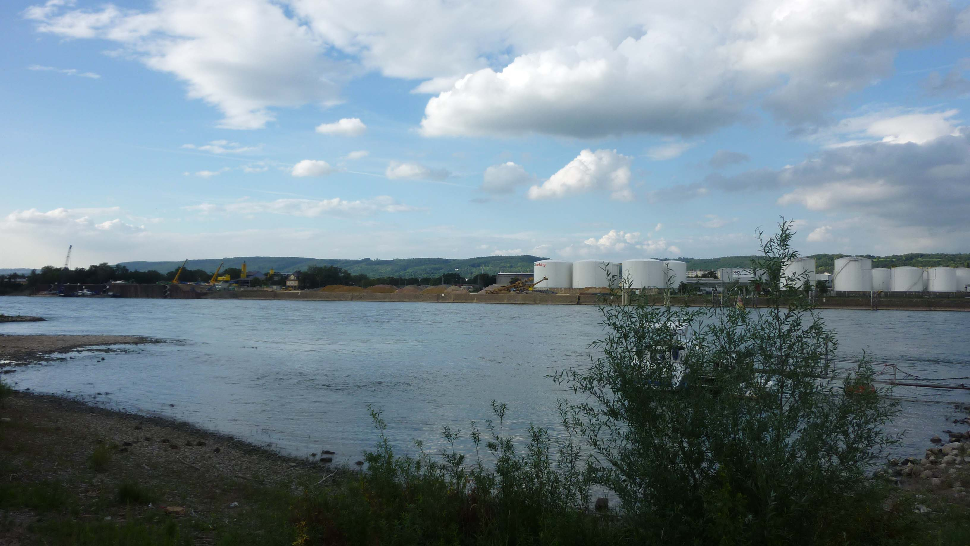 Schüttgutlager Hafen Bendorf